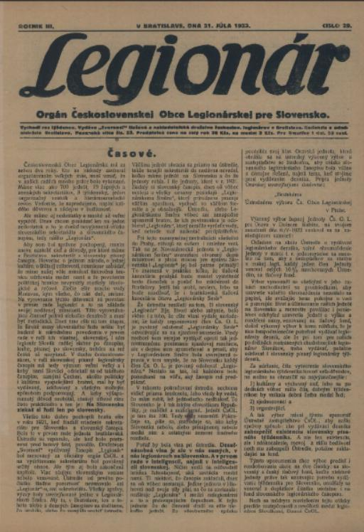 Titulný list časopisu Legionár.